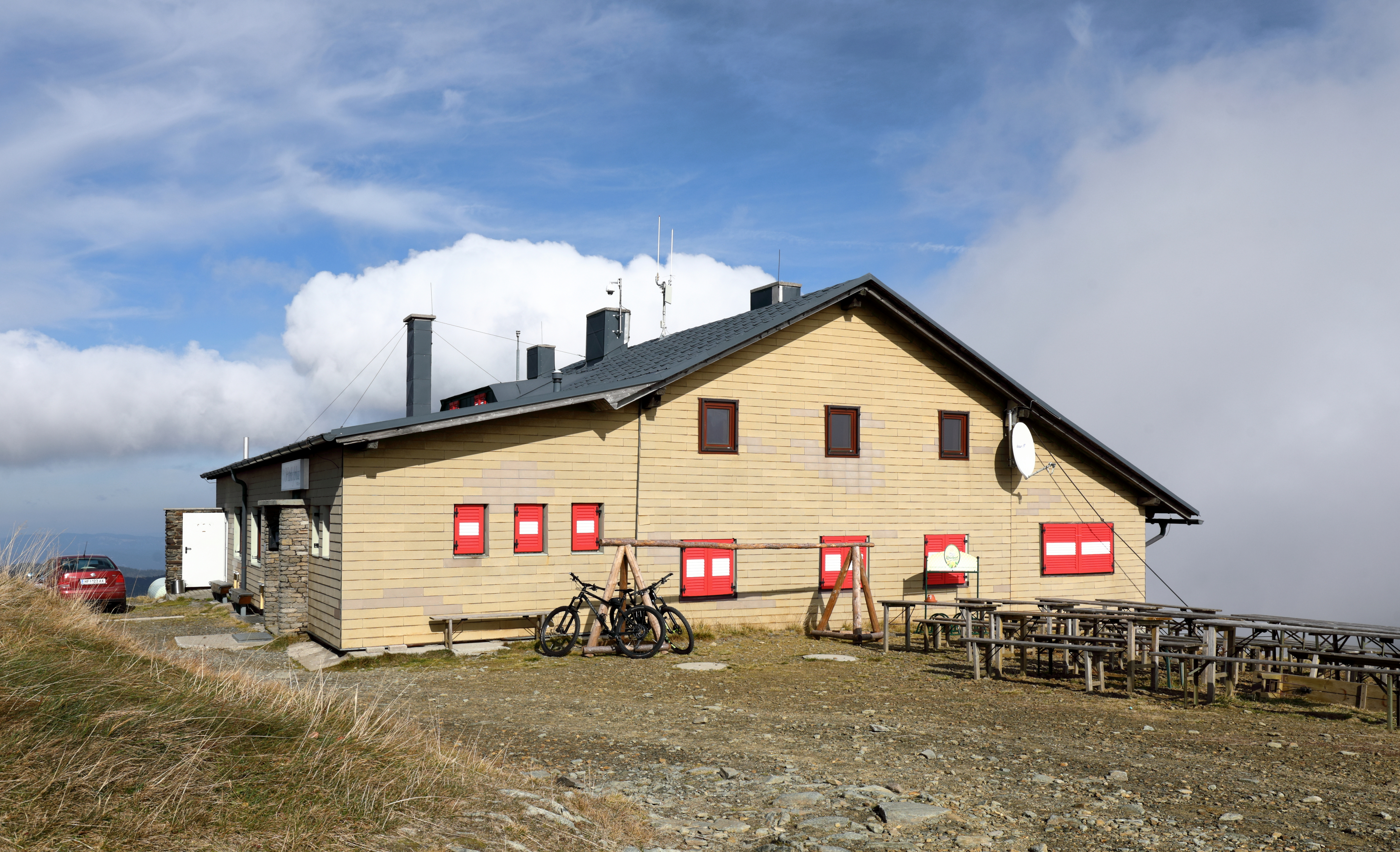 Südwestansicht des Wetterkoglerhauses auf dem Gipfel des 1743 m hohen Wechsel. Es ist eine Alpenvereinshütte des Österreichischen Gebirgsvereins und befindet sich auf dem Gemeindegebiet der niederösterreichischen Gemeinde Aspangberg-St. Peter, direkt an der Landesgrenze zur Steiermark.Die 1. Hütte wurde von der Alpinen Gesellschaft „Wetterkogler“ errichtet, am 20. August 1899 feierlich eröffnet und 1905 aufgestockt. 1912 wurde rechtwinkelig zur bestehenden Hütte eine größerer Anbau und eine Veranda errichtet. Am 21. Nov. 1915 brannte das Schutzhaus bis zur Grundmauer ab. 1923 wurde ein neues Wetterkoglerhaus errichtet. Dieses wurde 1930 durch einen Zubau für einen zweiten Gastraum sowie neue Schlafräume erweitert und 1934 erfolgte noch ein Anbau für einen Schiraum.